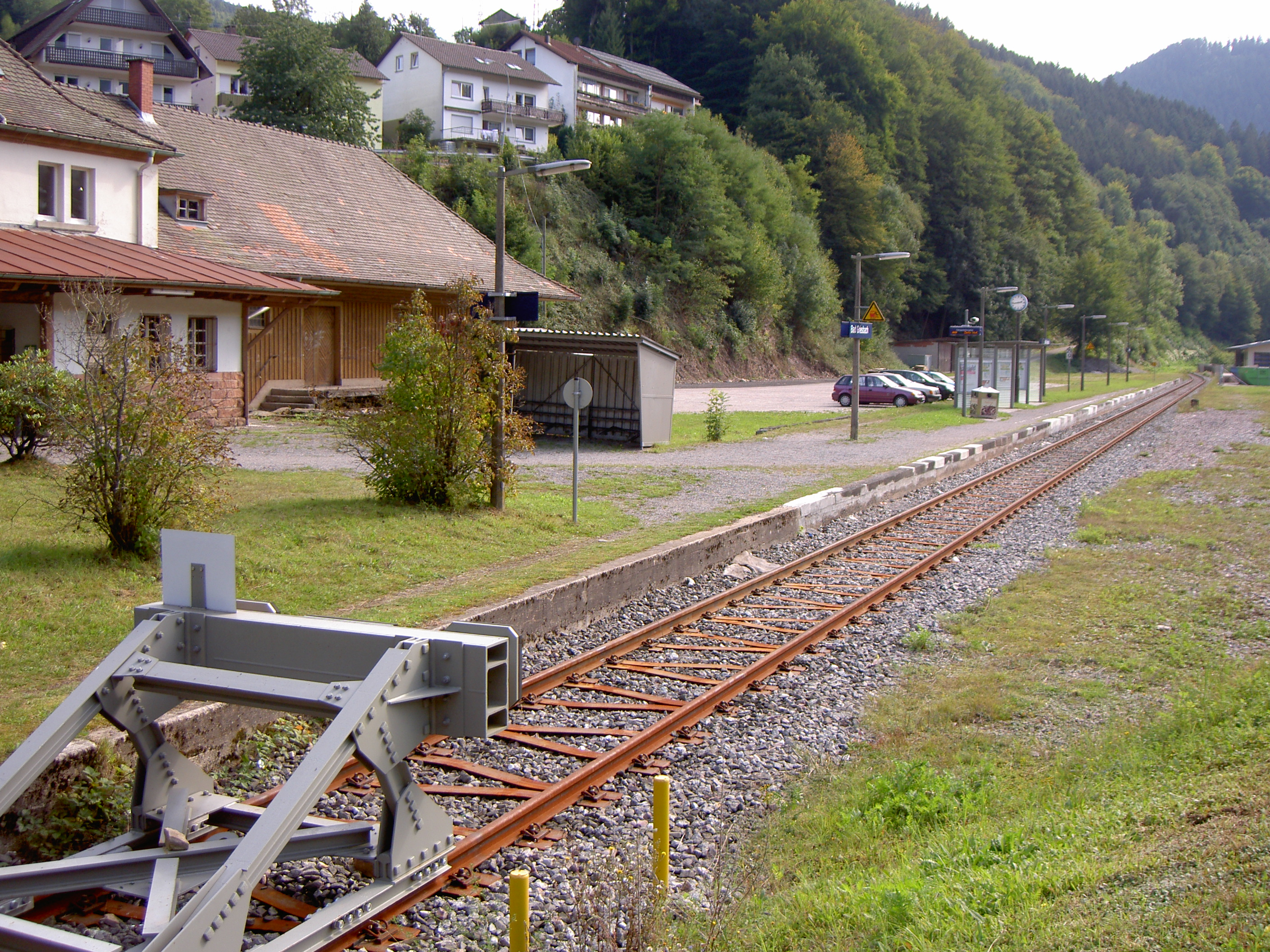 Endpunkt Renchtalbahn.